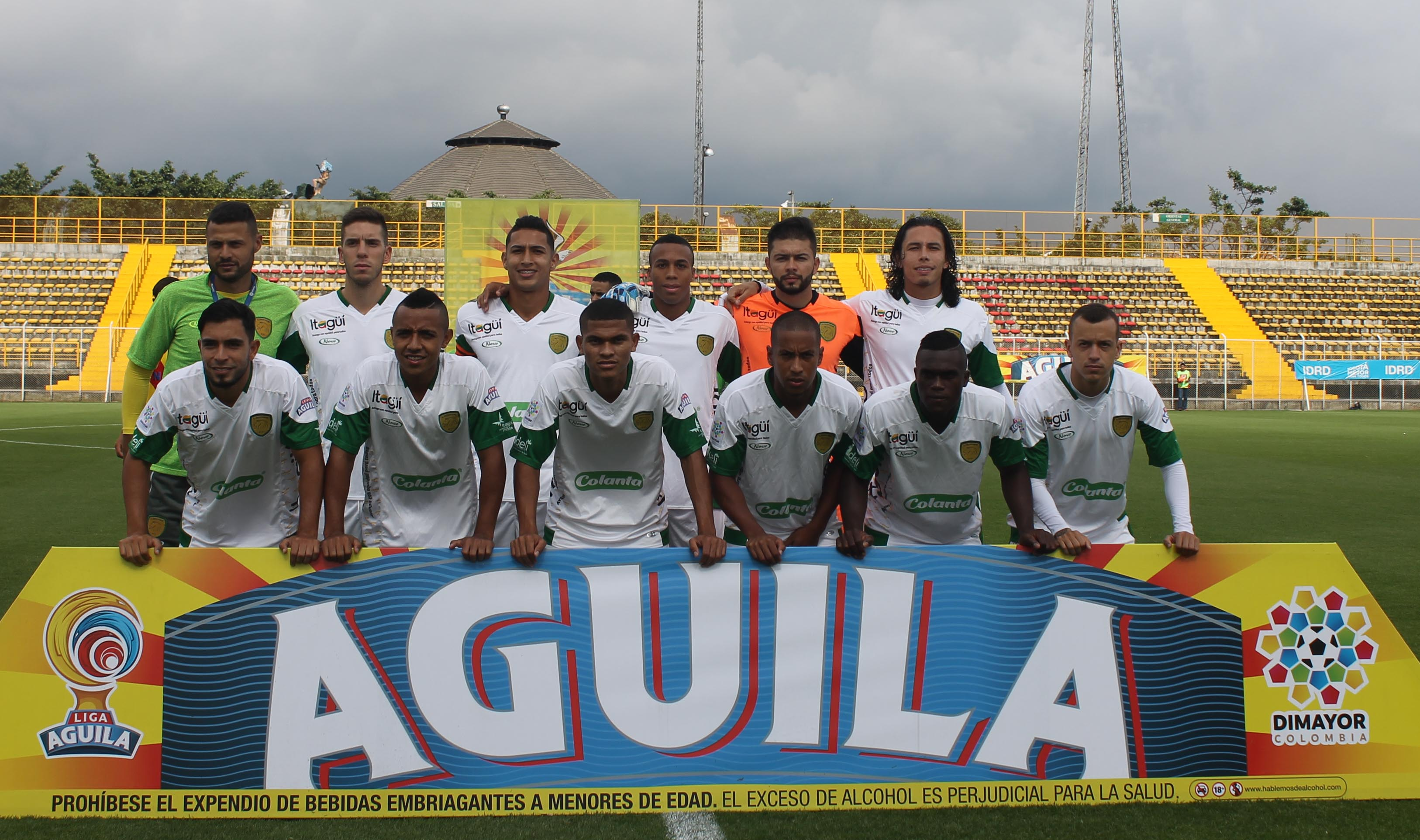 Jugadores de Itagüí Leones en la Primera B colombiana.